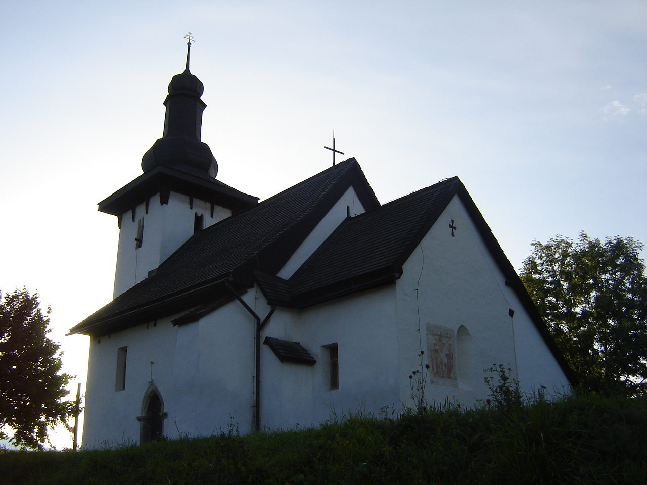 Kostol sv. Martina s freskou